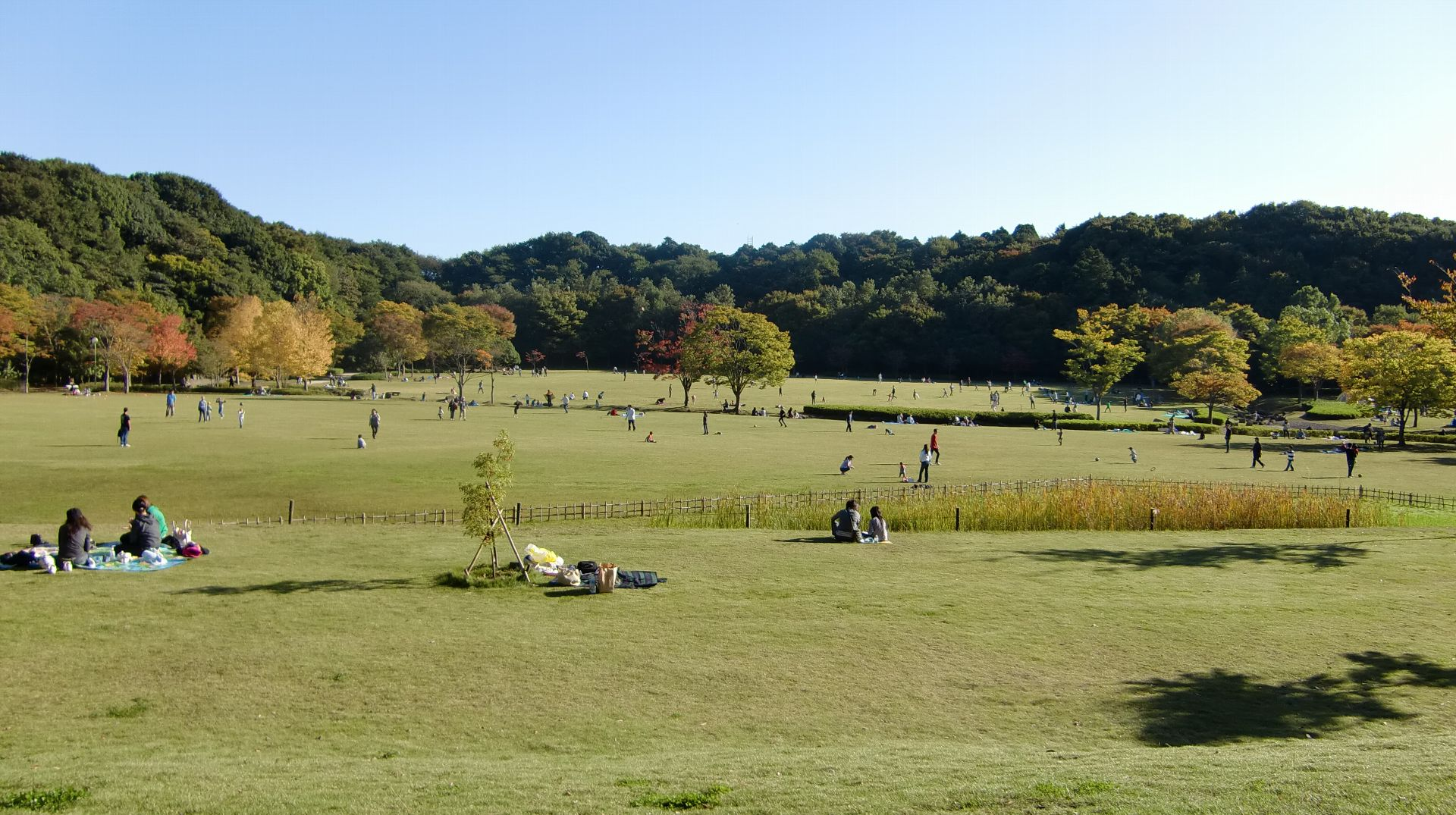 広大な芝地